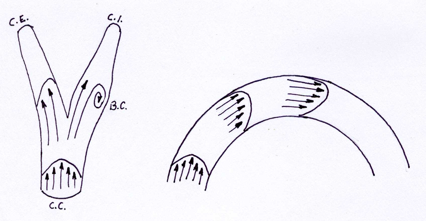 L'aterosclerosi predilige la parete laterale del bulbo carotideo, dove si verifica separazione del flusso e ricircolo, e la parete concava delle curvature arteriose, dove il flusso è rallentato. La biforcazione delle arterie è una regione resistente allo sviluppo delle lesioni, grazie all'elevato shear stress.